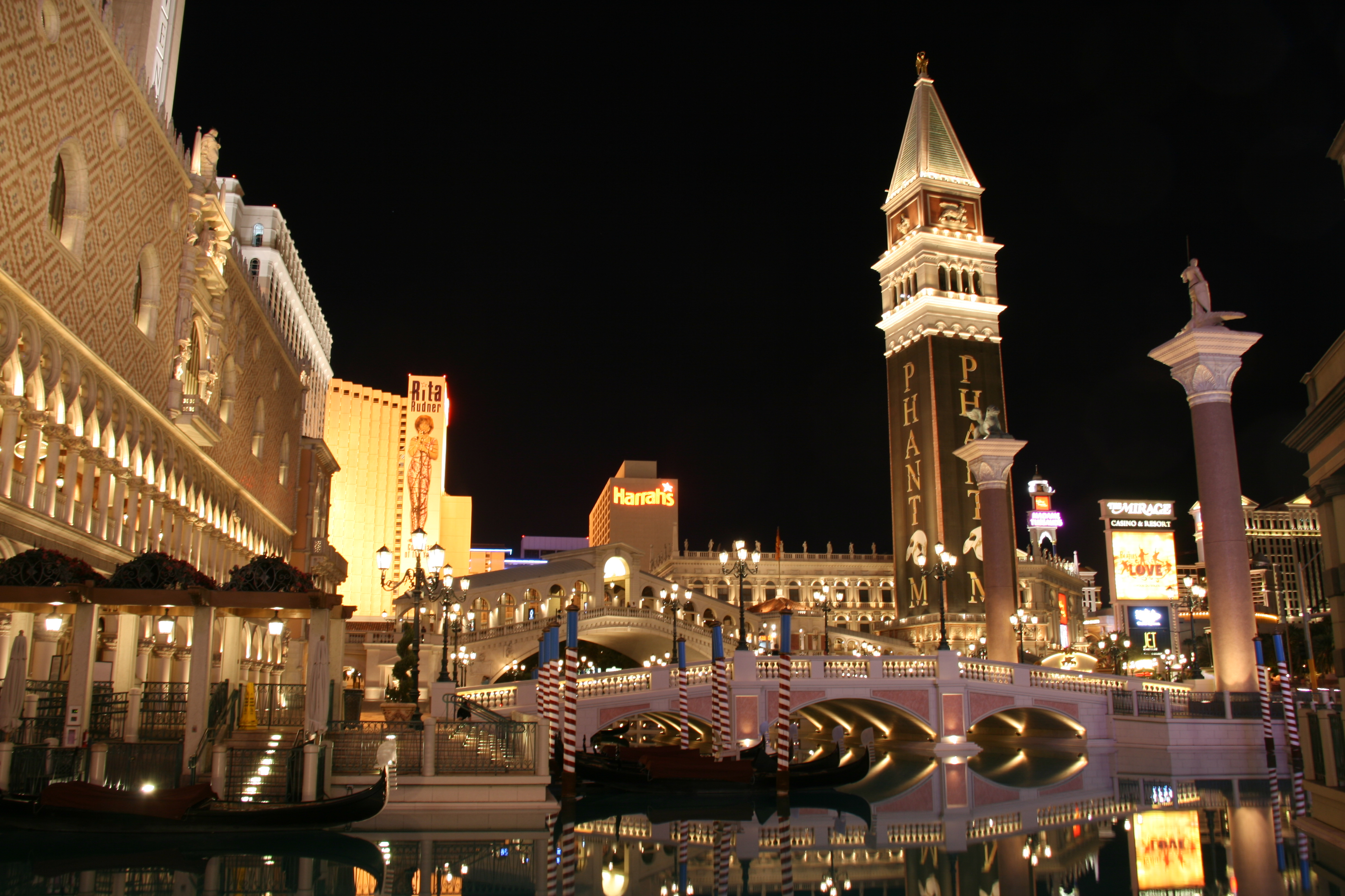 Das "The Venetian Hotel & Casino" in Las Vegas bei Nacht